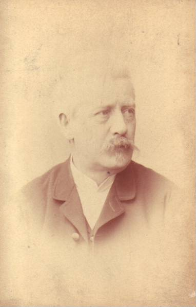 prof. Julius Mařák (1832-1899)